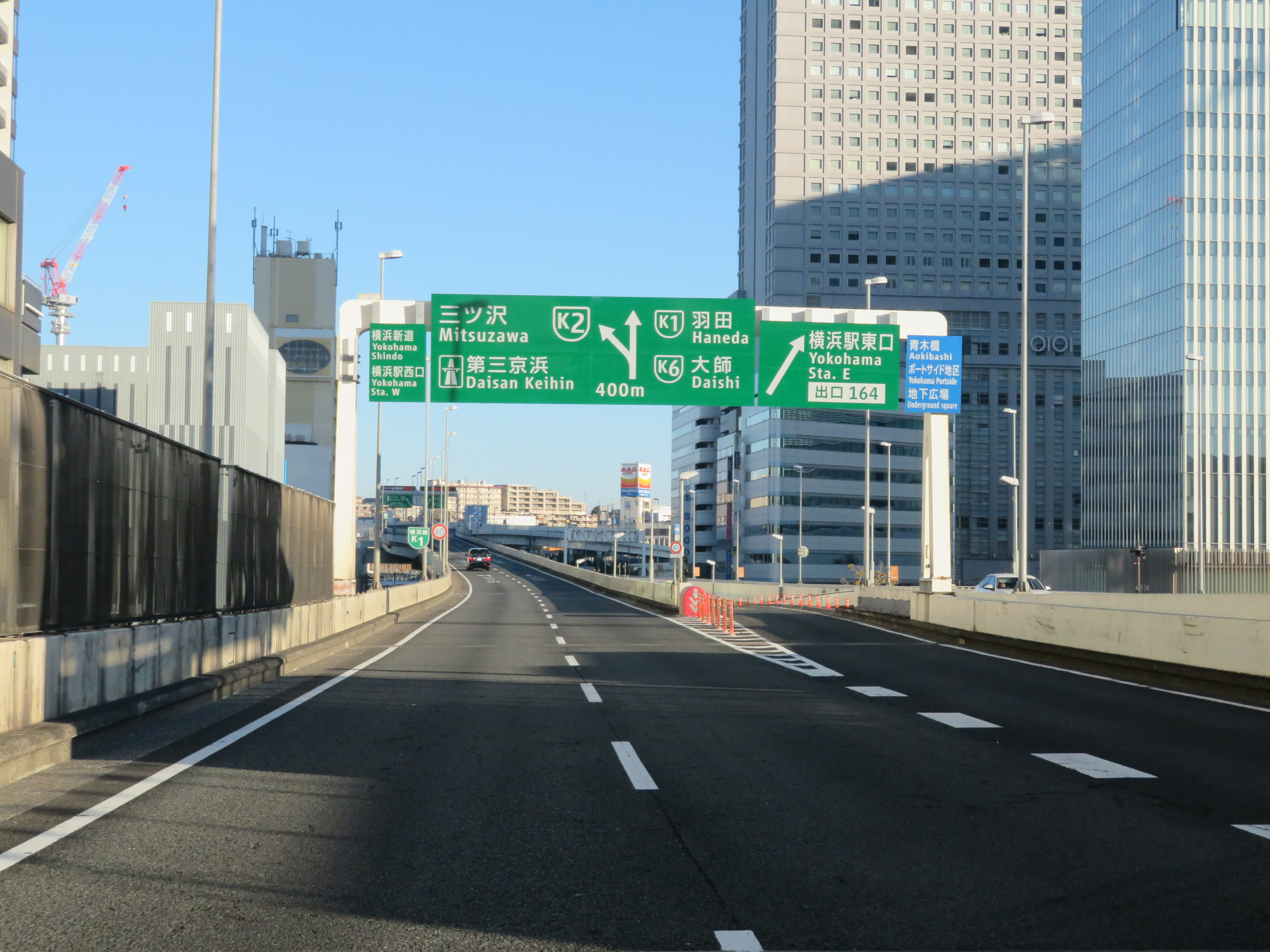 首都高速道路神奈川1号横羽線横浜駅東口出入口（上り出口付近）